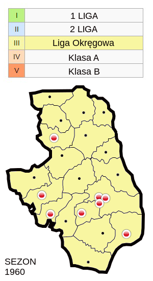 Jagiellonia w sezonie 1960 - mapa klubów